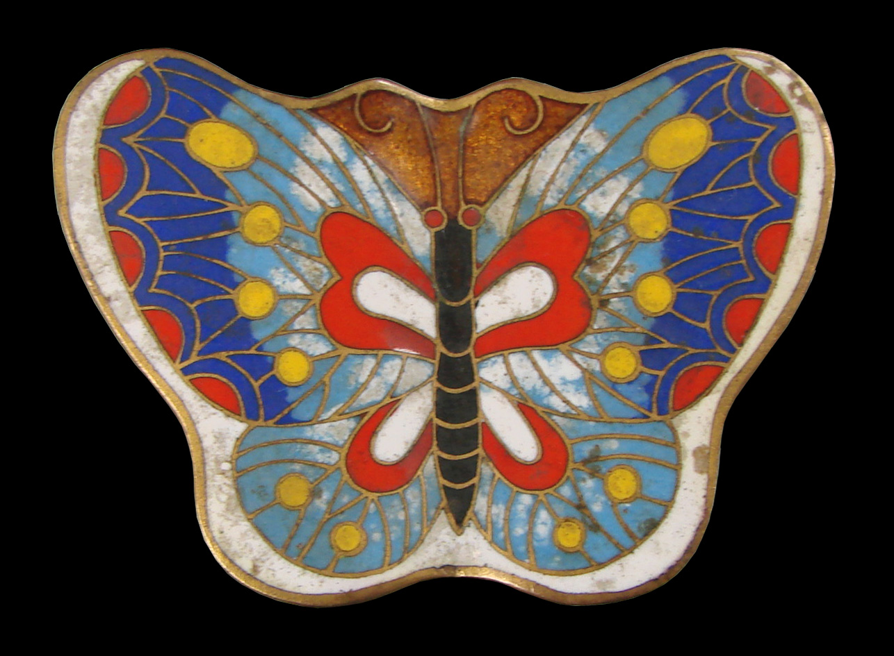 Box,enamels,cloisonné,China (about 8 cm).